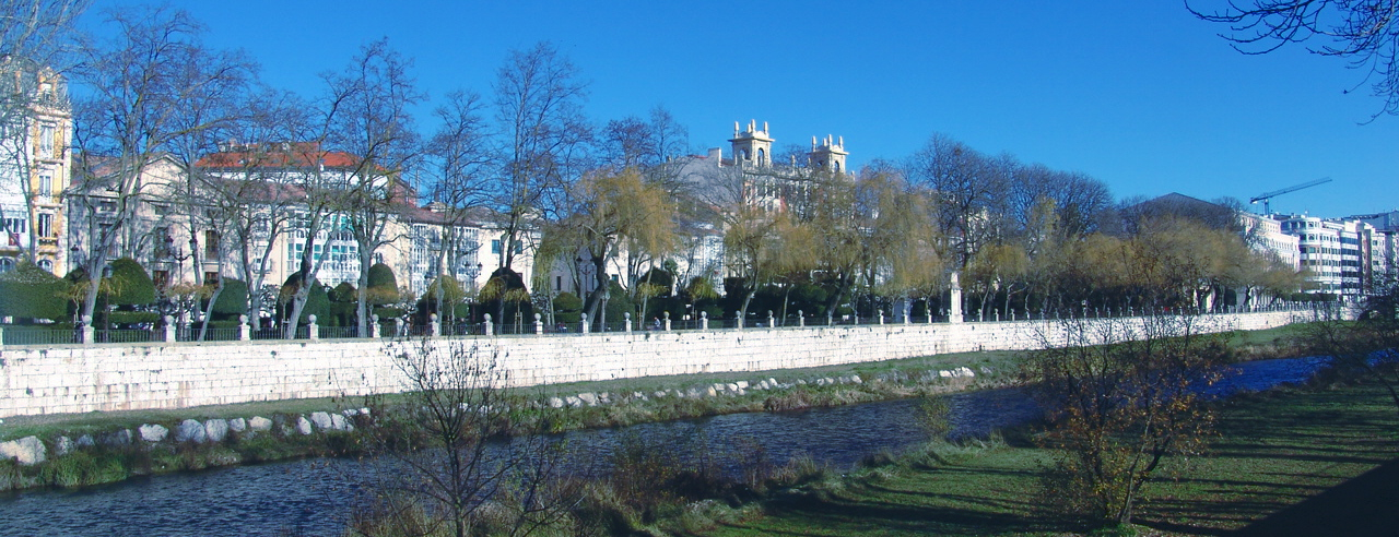 Río Arlanzón a su paso por la ciudad de Burgos, España. Al fondo el paseo del Espolón.